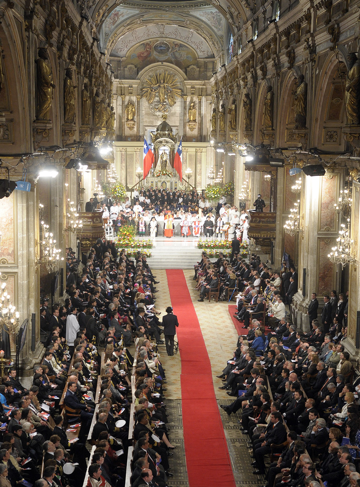 El Te Deum Ecuménico de Acción de Gracias se llevó a cabo en la Catedral Metropolitana durante la mañana del sábado 18 de septiembre. Esta ceremonia fue oficiada por el cardenal de Santiago, monseñor Francisco Javier Errázuriz, y contó con la presencia del Presidente de la República, Sebastián Piñera, y su esposa, Cecilia Morel. Además del Jefe de Estado, ministros y numerosas autoridades del país, asistieron al Te Deum distintas delegaciones extranjeras y el Presidente de Bolivia, Evo Morales, y su par de Paraguay, Fernando Lugo. El Te Deum Ecuménico de Acción de Gracias se llevó a cabo en la Catedral Metropolitana durante la mañana del sábado 18 de septiembre. Esta ceremonia fue oficiada por el cardenal de Santiago, monseñor Francisco Javier Errázuriz, y contó con la presencia del Presidente de la República, Sebastián Piñera, y su esposa, Cecilia Morel. Además del Jefe de Estado, ministros y numerosas autoridades del país, asistieron al Te Deum distintas delegaciones extranjeras y el Presidente de Bolivia, Evo Morales, y su par de Paraguay, Fernando Lugo.